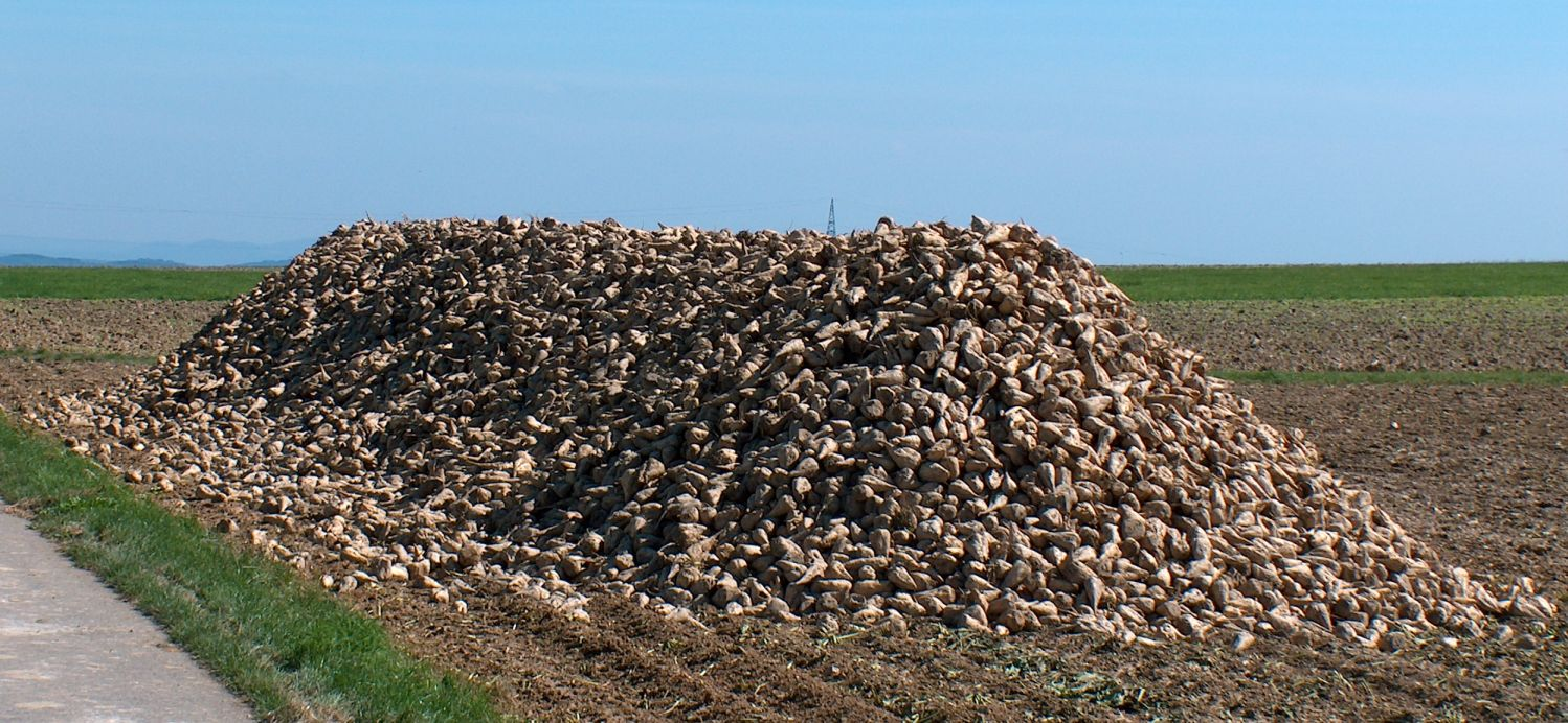 Ein Berg Zuckerrüben (Miete) nach der Ernte, auf einem Feld bei Heimerdingen